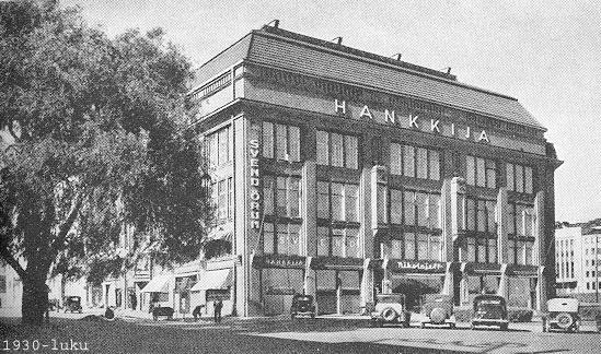 Arkadiankatu 2 (valmistunut 1913), vuodesta 1918 ns. Hankkijan talo